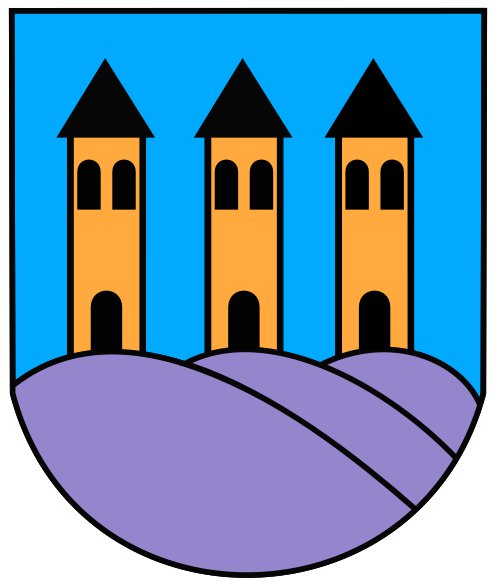 Herb Dzielnicy Zamysłów w Rybniku